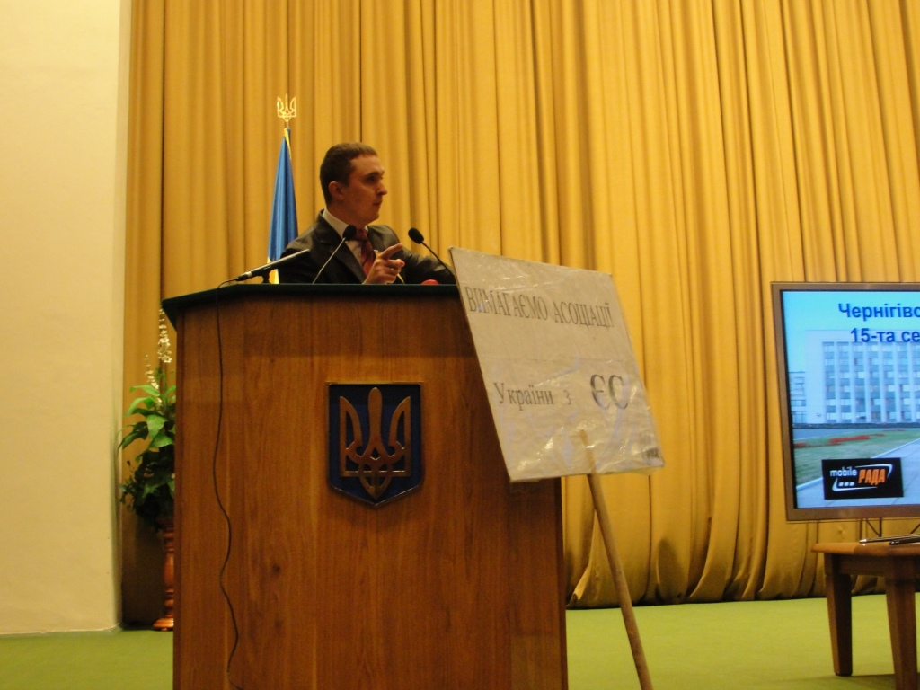 Олександр Кодола вимагає у депутатів Чернігівської обласної ради підтримати звернення до Віктора Януковича з вимогою підписати Угоду про асоціацію з Європейським Союзом